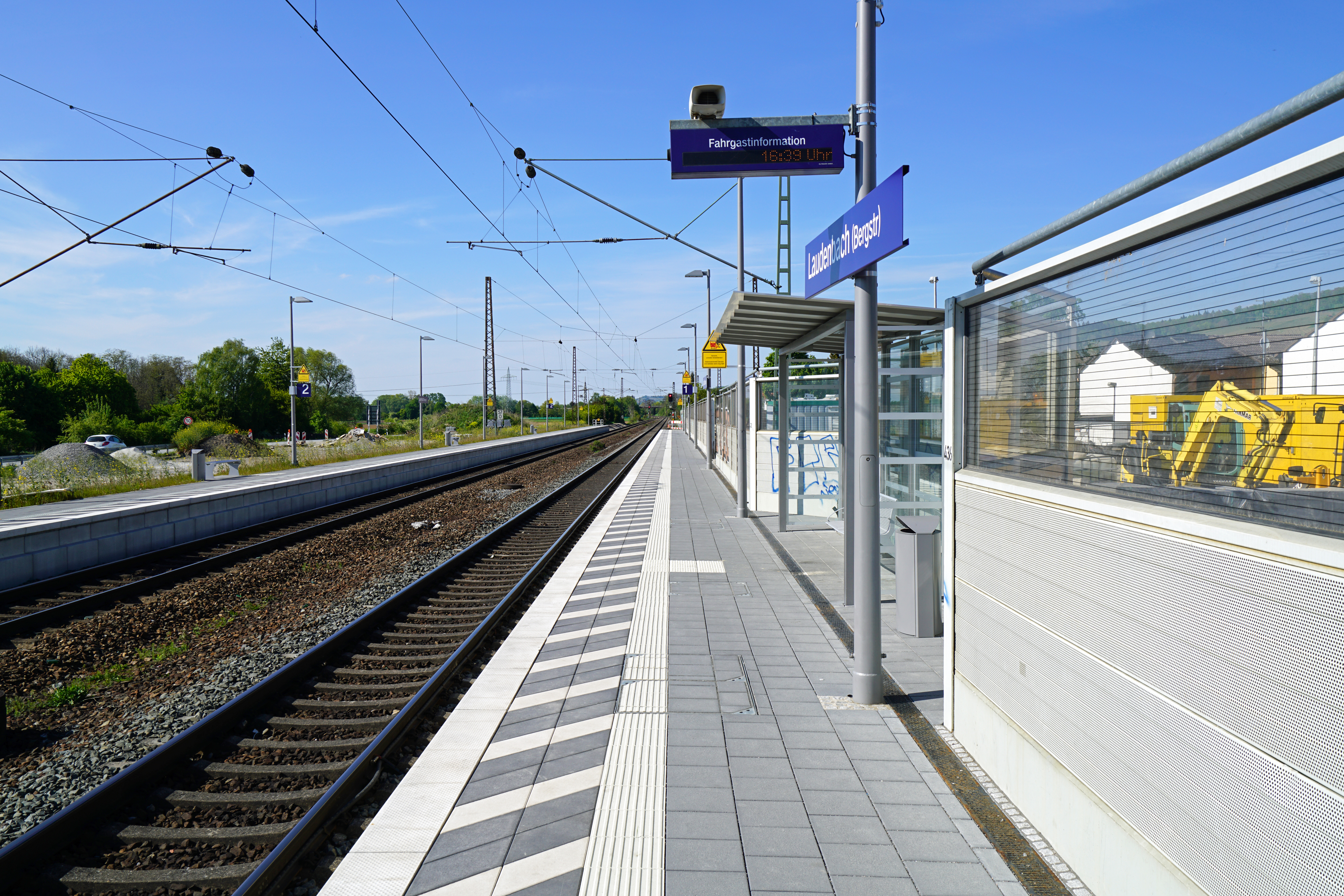 Der Bahnhof Laudenbach (Bergstr) in Laudenbach (Bergstraße) an der Main-Neckar-Eisenbahn in Baden-Württemberg